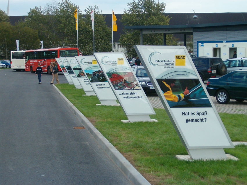 Fahrsicherheitszentrum Lüneburg Ausfahrt (Aug 04)